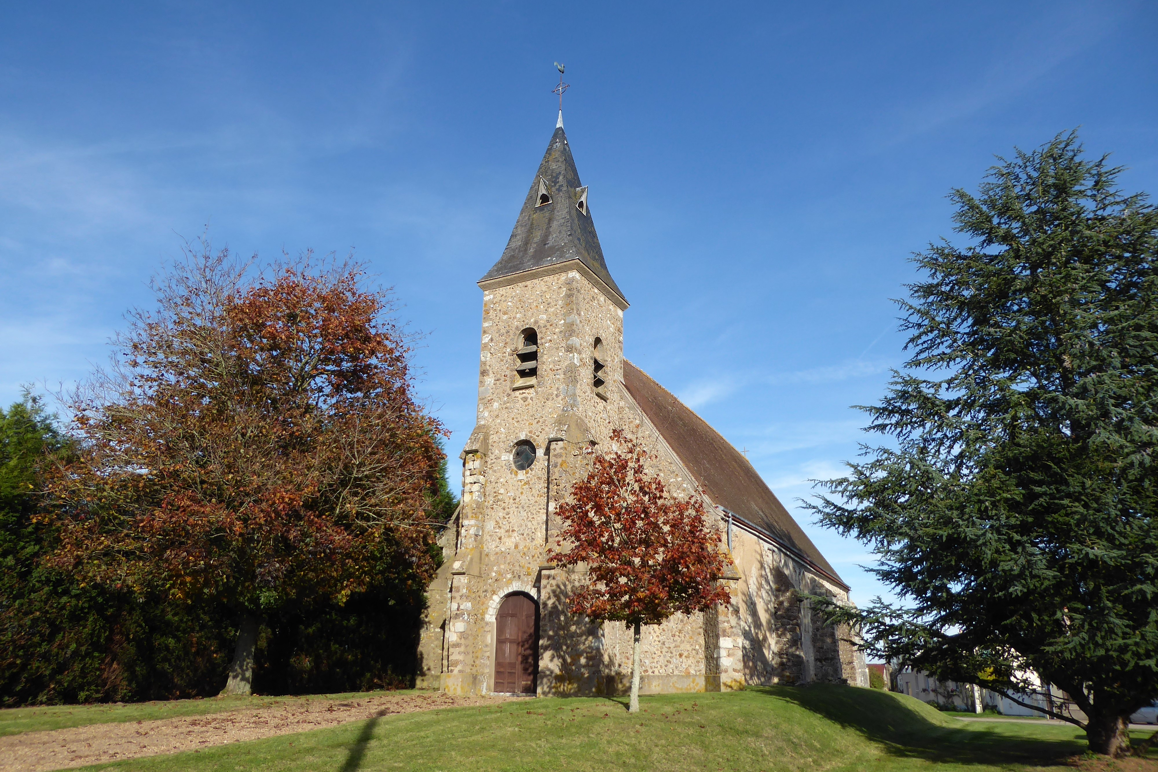 tour ouest de l'église Notre-Dame, Mézières-au-Perche, Eure-et-Loir, France.